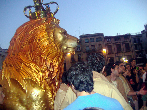 El Lleó de Reus ballant a la Plaça del mercadal per sant Pere